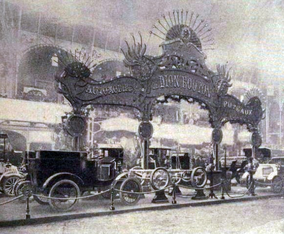 De Dion-Bouton au Salon de Paris en 1901 (La Vie au Grand Air du 22 décembre 1901)